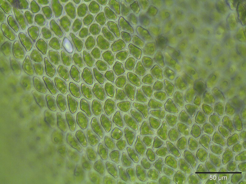 Sumpf-Streifensternmoos (Aulacomnium palustre), Laminazellen, 400x vergrößert